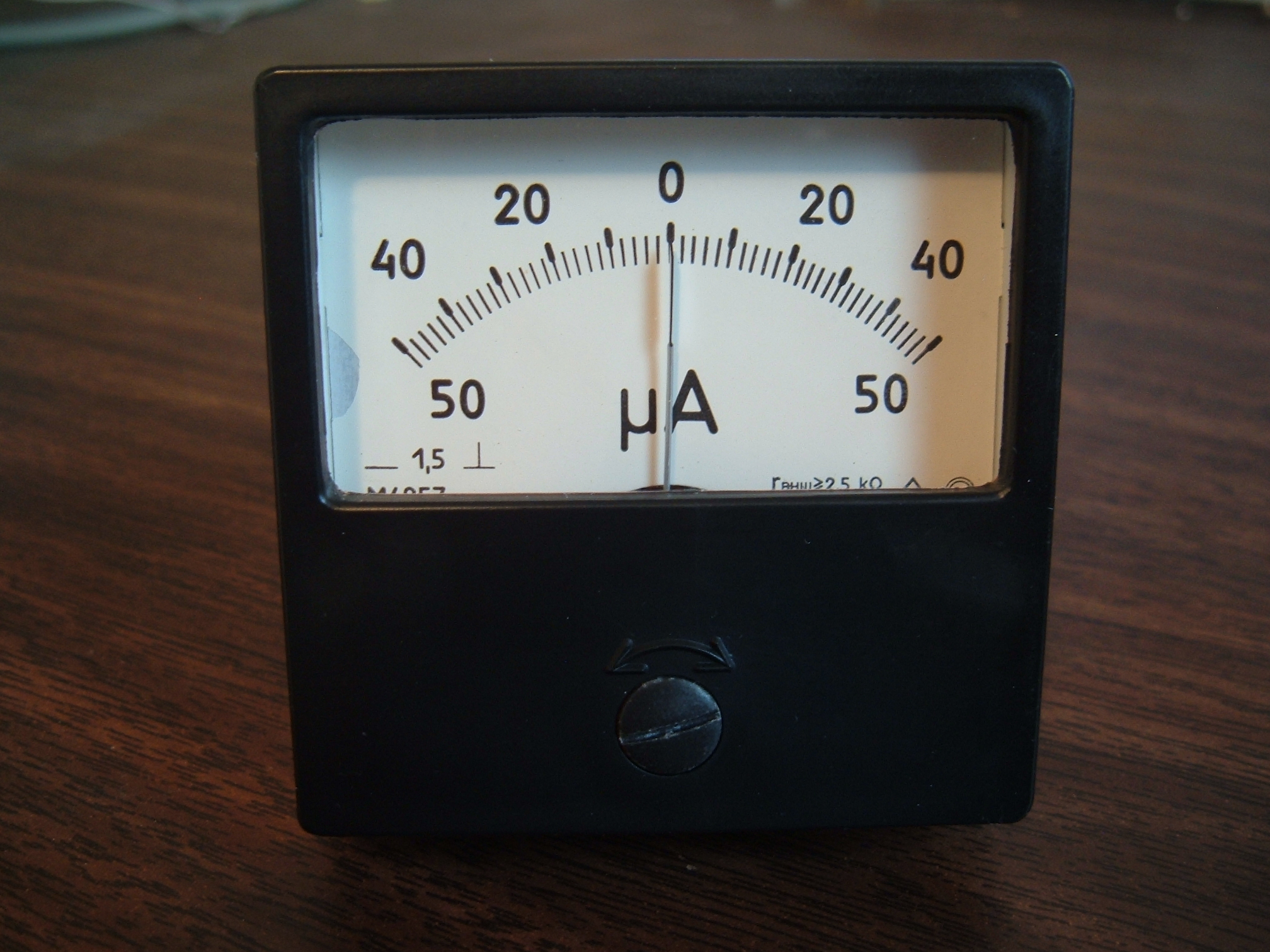 Zero-Center Ammeter